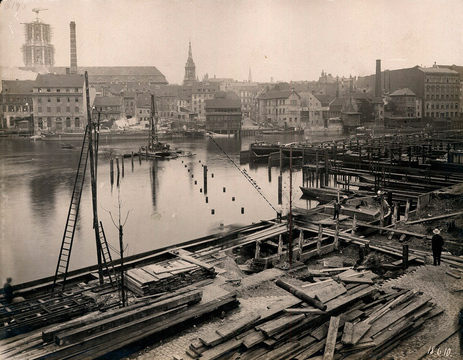 Berlin, Foto aus der Zeit des U-Bahn-Baus 1907–1915; ca. 28 x 23 cm. Mit Datum rechts unten. Spree (Nähe Fischerinsel/Inselbrücke), der Turm links ist der Turm des Alten Stadthauses